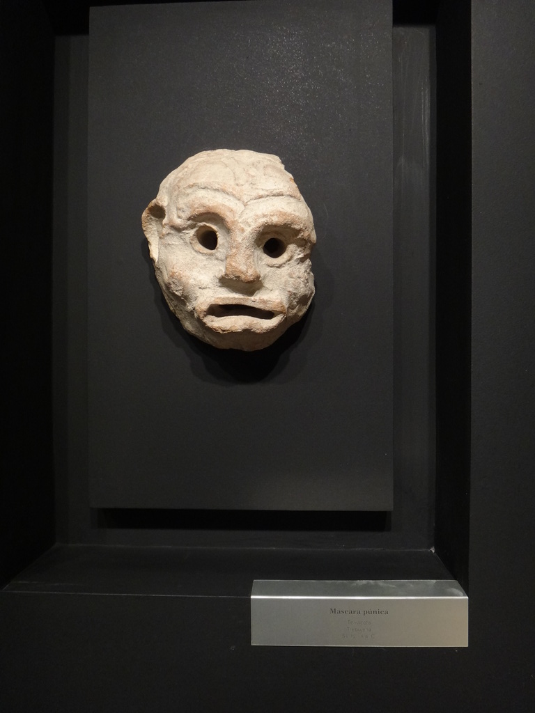 Museo Arqueológico de Jerez de la Frontera (Andalucía, España).